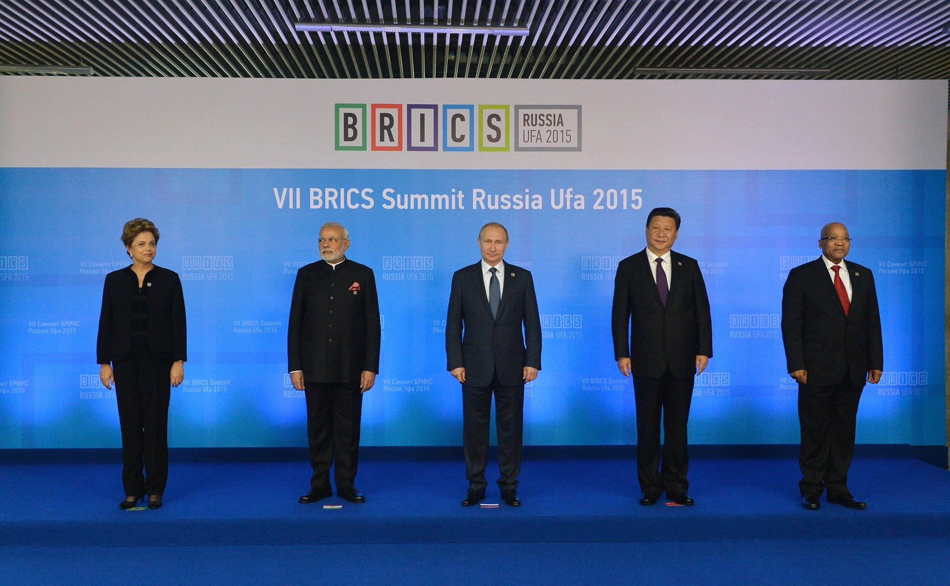 Участники саммита БРИКС